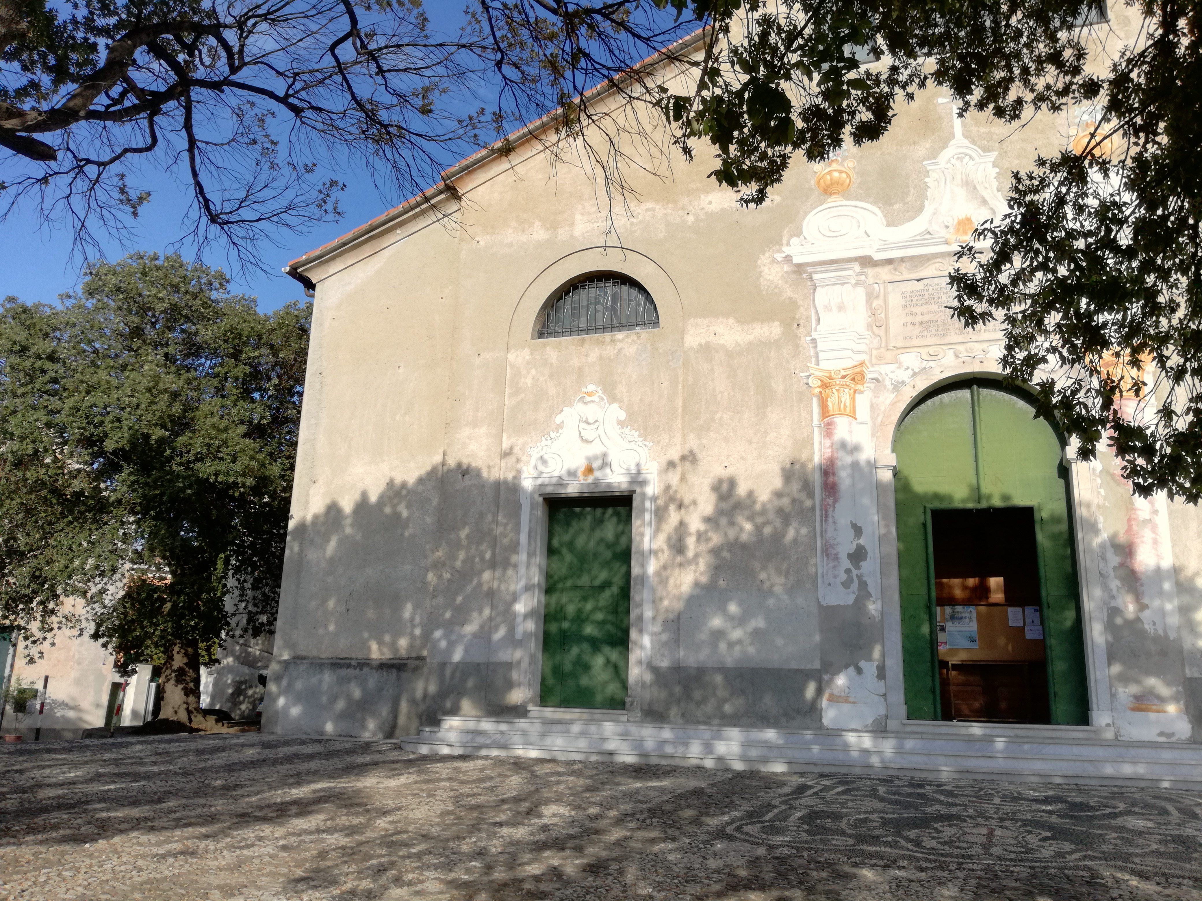 Nostra Signora del Monte (Genova)